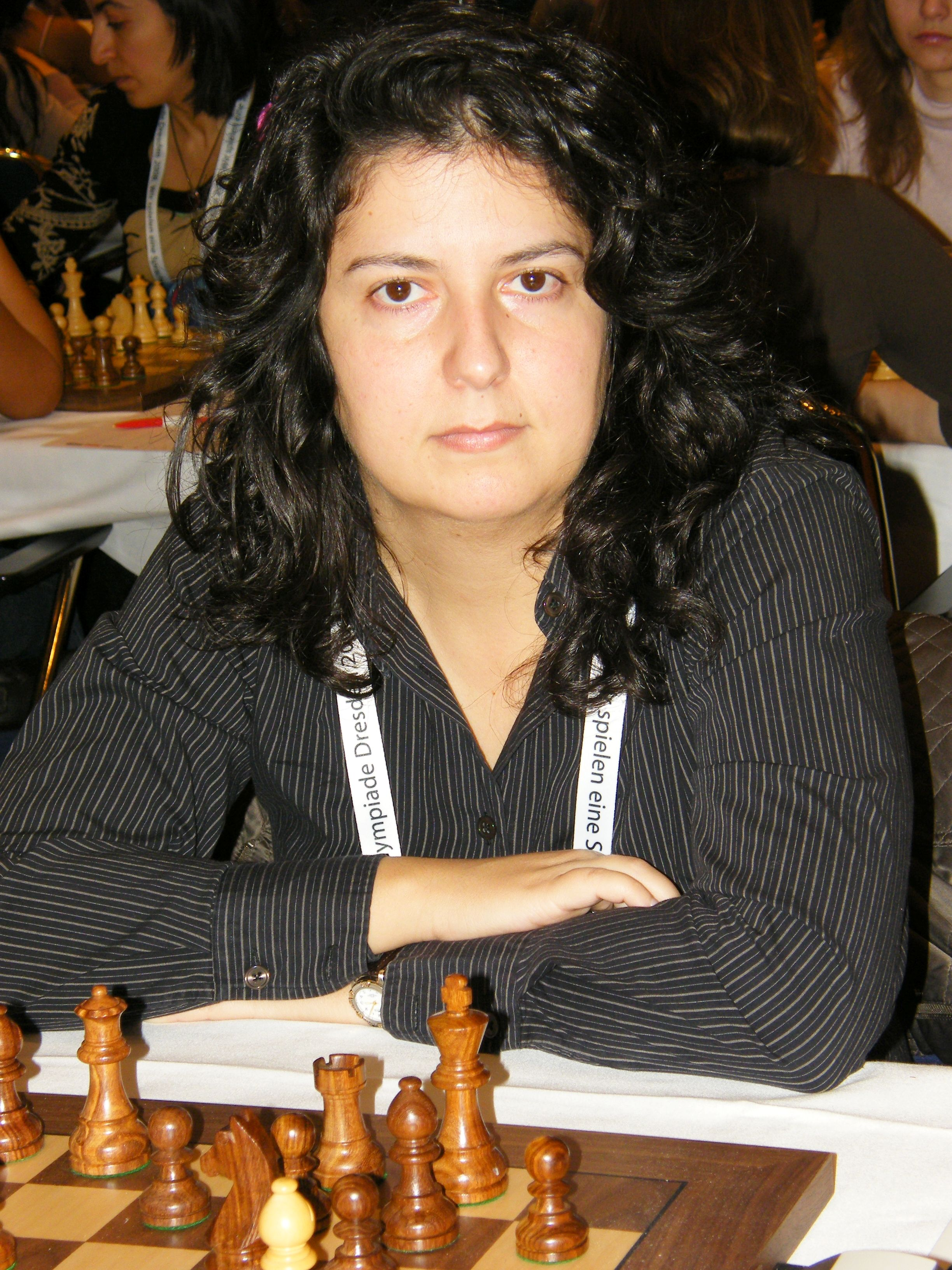 Monica Calzetta bei der 38. Schacholympiade in Dresden 2008